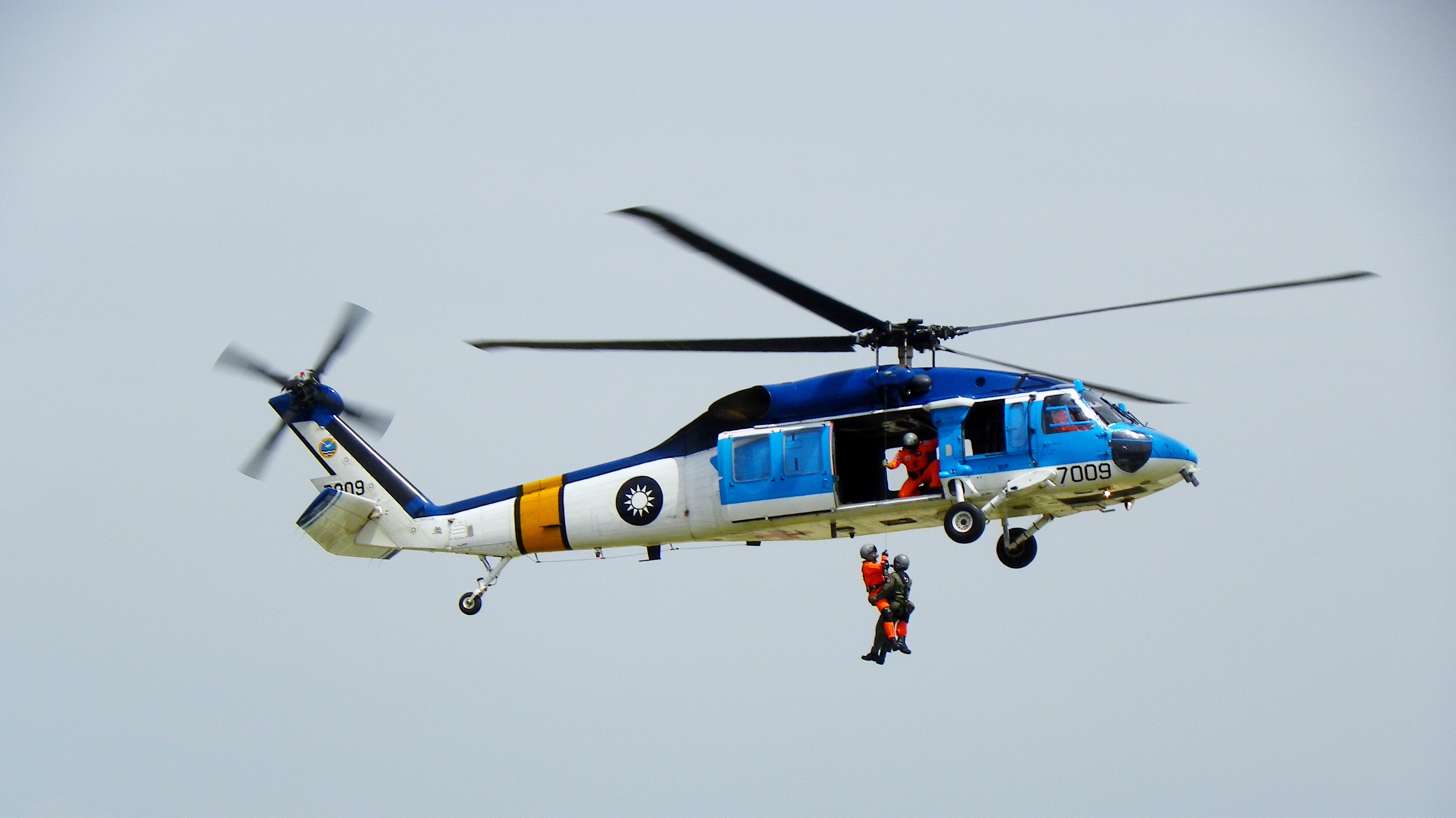 2011年8月13日空軍松山基地營區開放活動中，S-70C直昇機示範低空垂直吊降救援。